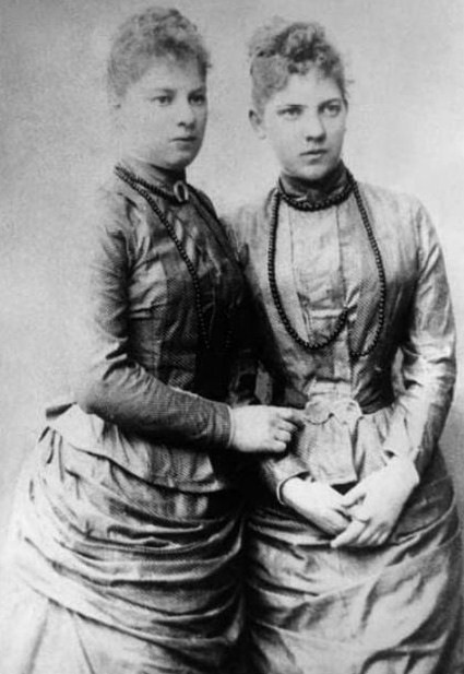 Дочери Б. П. Мансурова — Екатерина Борисовна (1861—1926) и Наталия Борисовна (1868—1934).